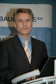 Bernd Hillemeier andere Versionen: GNU-FDL